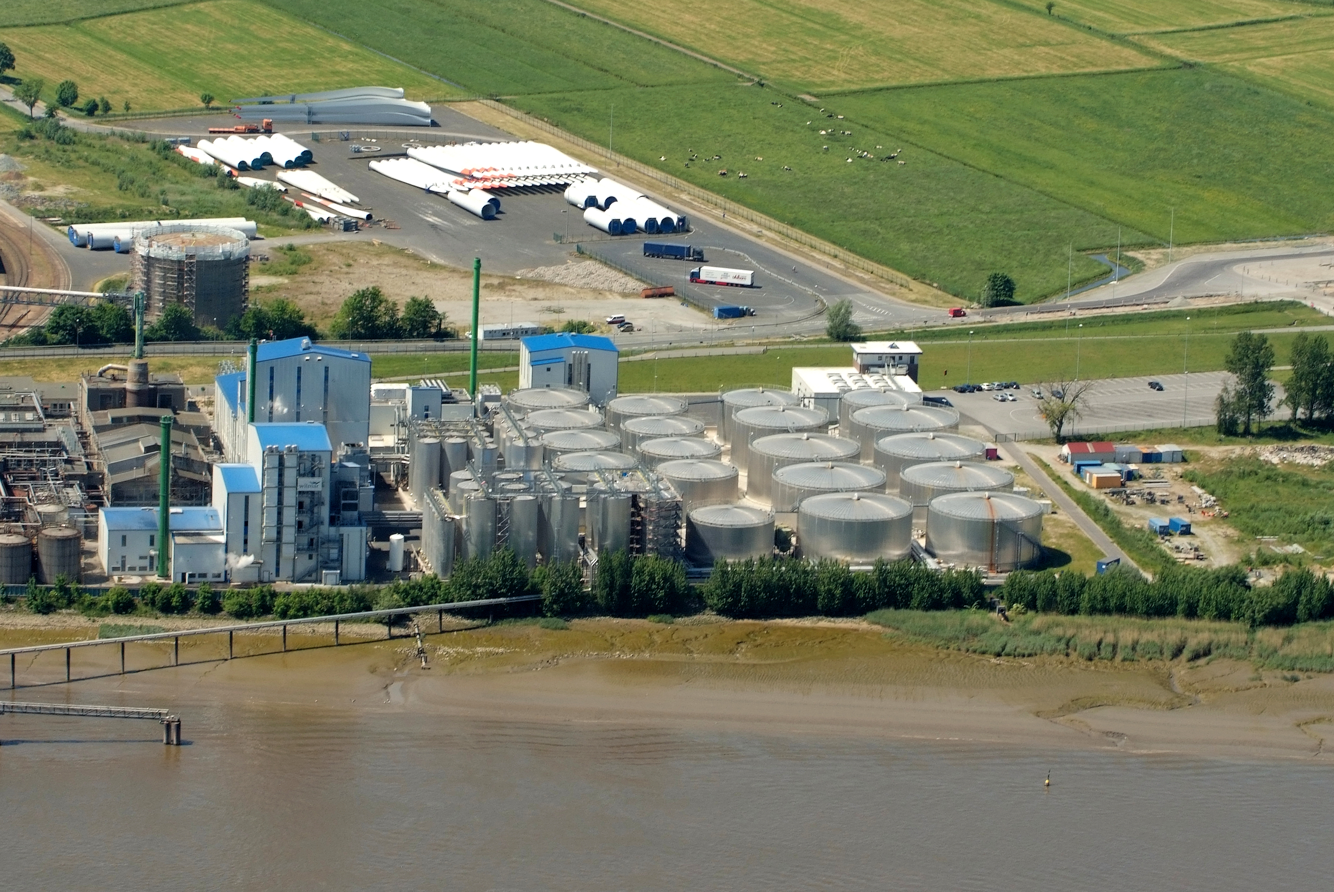 Fettraffinerie Wilmar Edible Oils GmbH, Brake (Unterweser) Fotoflug vom Flugplatz Nordholz-Spieka über Cuxhaven und Wilhelmshaven